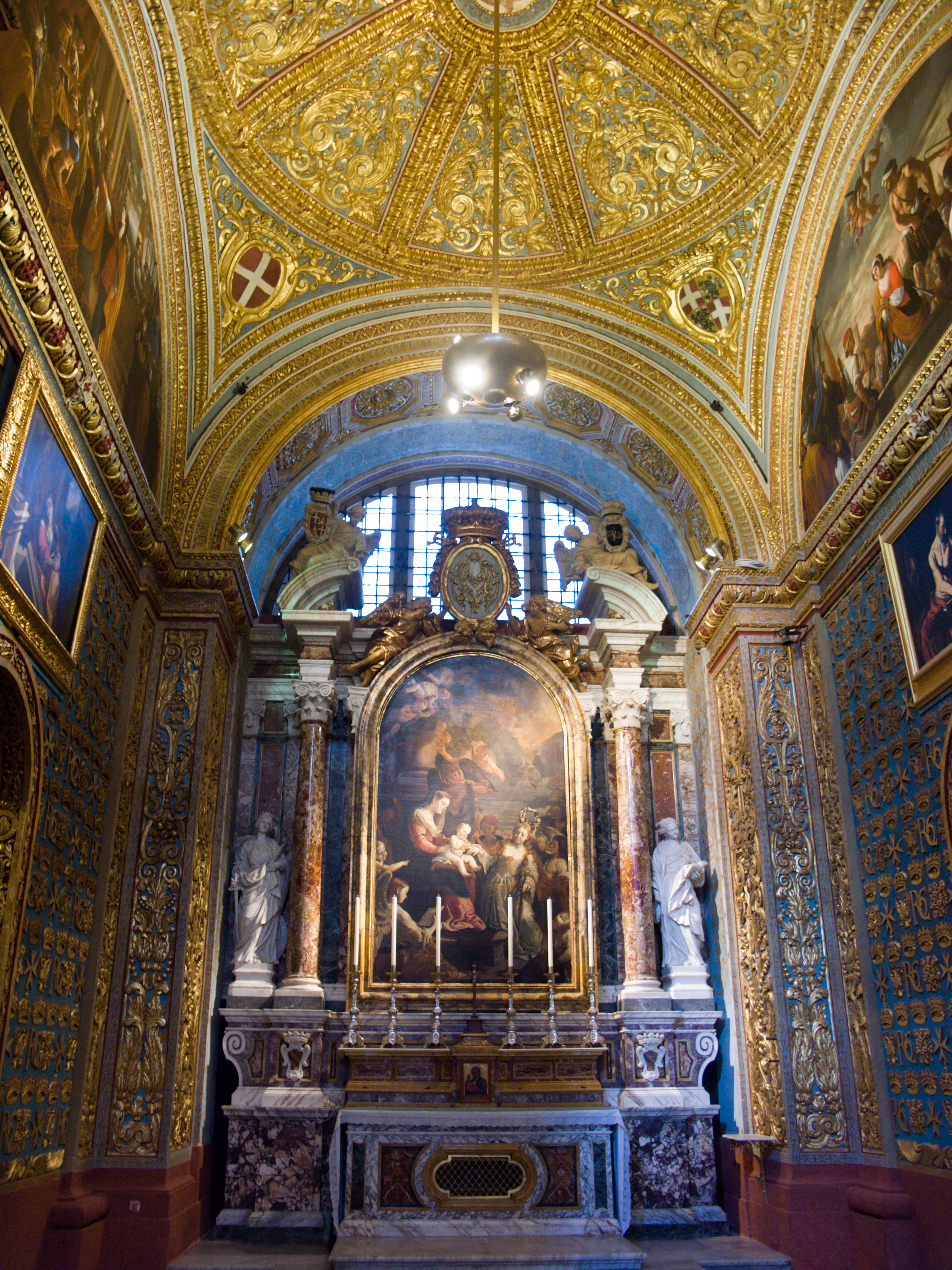 Une des chapelles de la cathédrale St Jean à La Valette - Malte